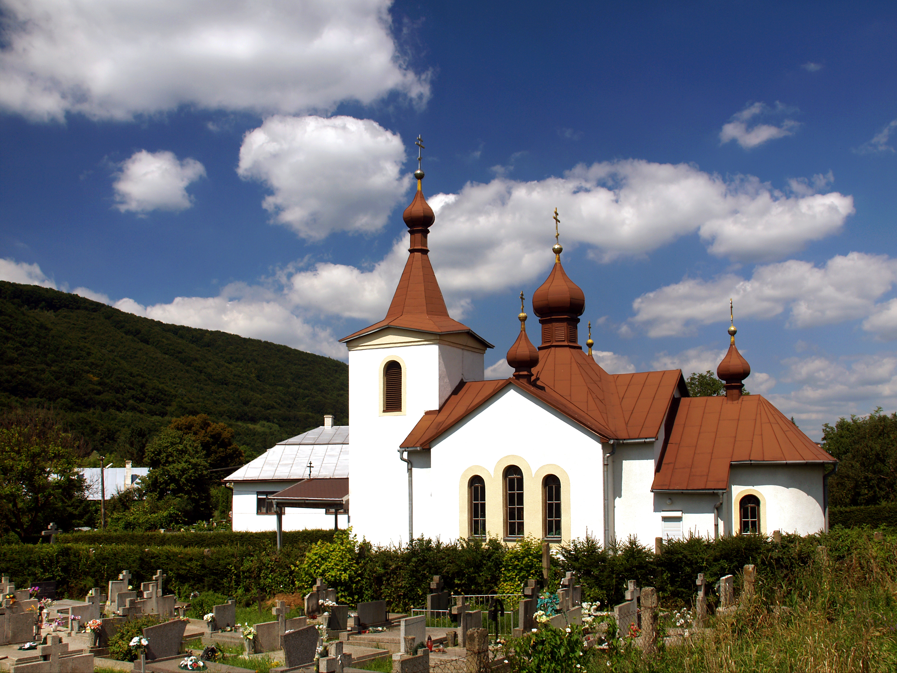 Čabiny , Presovsky (Slovaquie) - Église orthodoxe russe